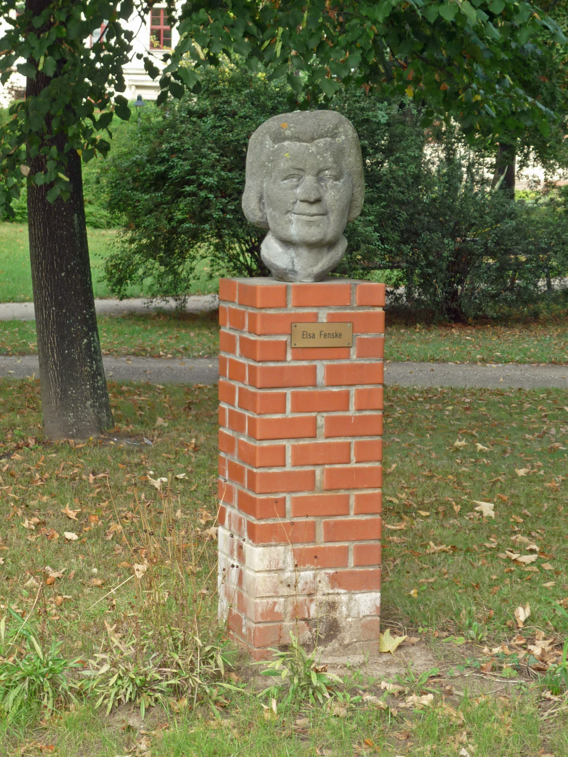 Büste Elsa Fenske am Seniorenheim Freiberger Straße in Dresden-Altstadt